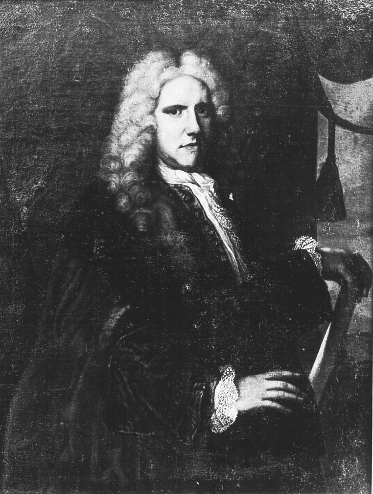 Johann Balthasar von Mülheim, Bürgermeister von Köln 1699-1701